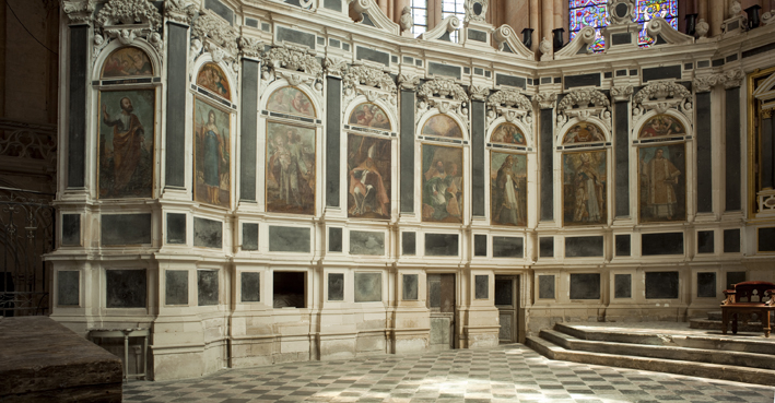 Toul (Meurthe-et-Moselle, France), cathédrale St Étienne, retable du maître-autel avec ses 16 toiles, le tout classé M.H..